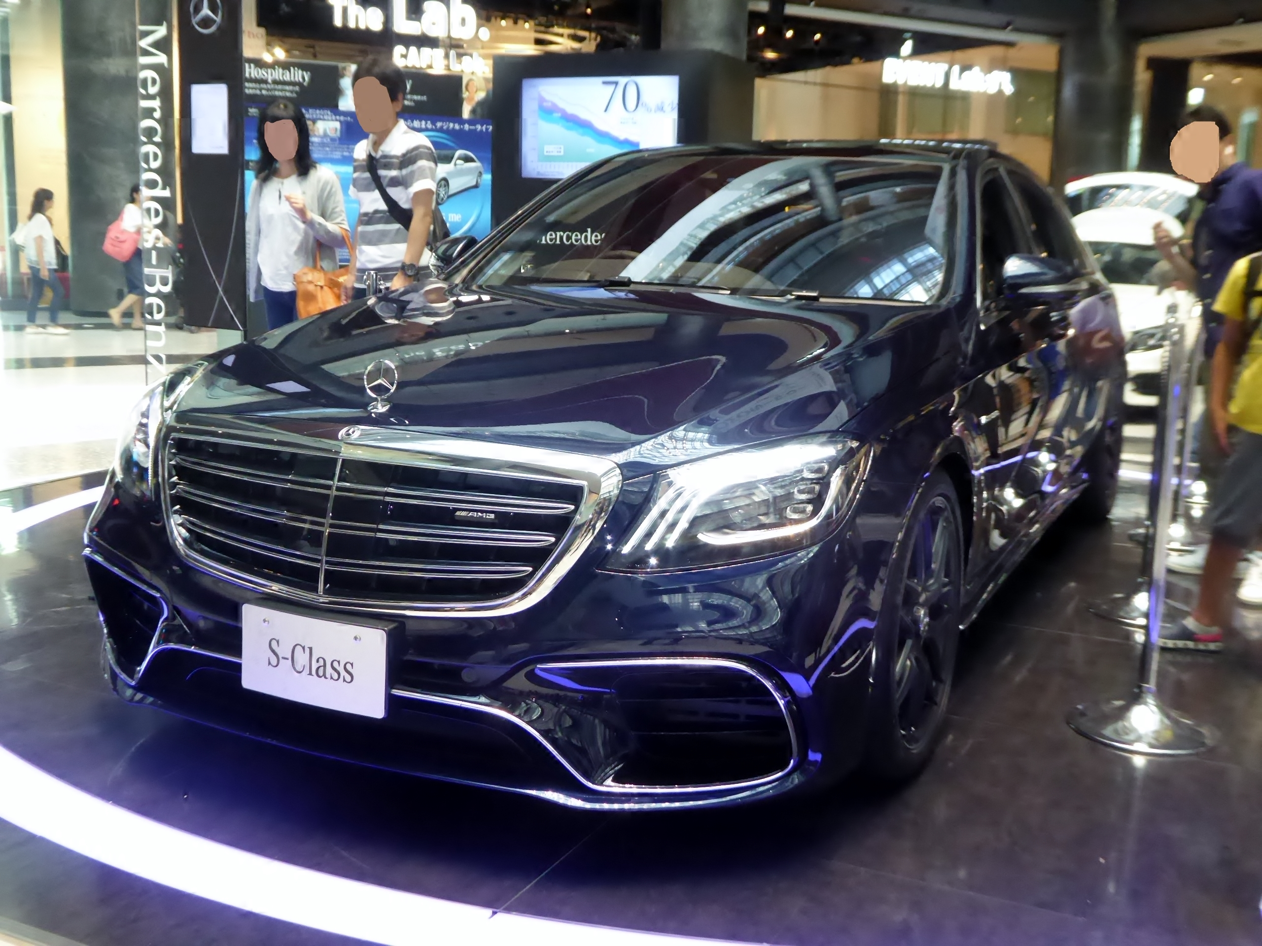 V222系メルセデスAMG・S63ロングをフロントから撮影。